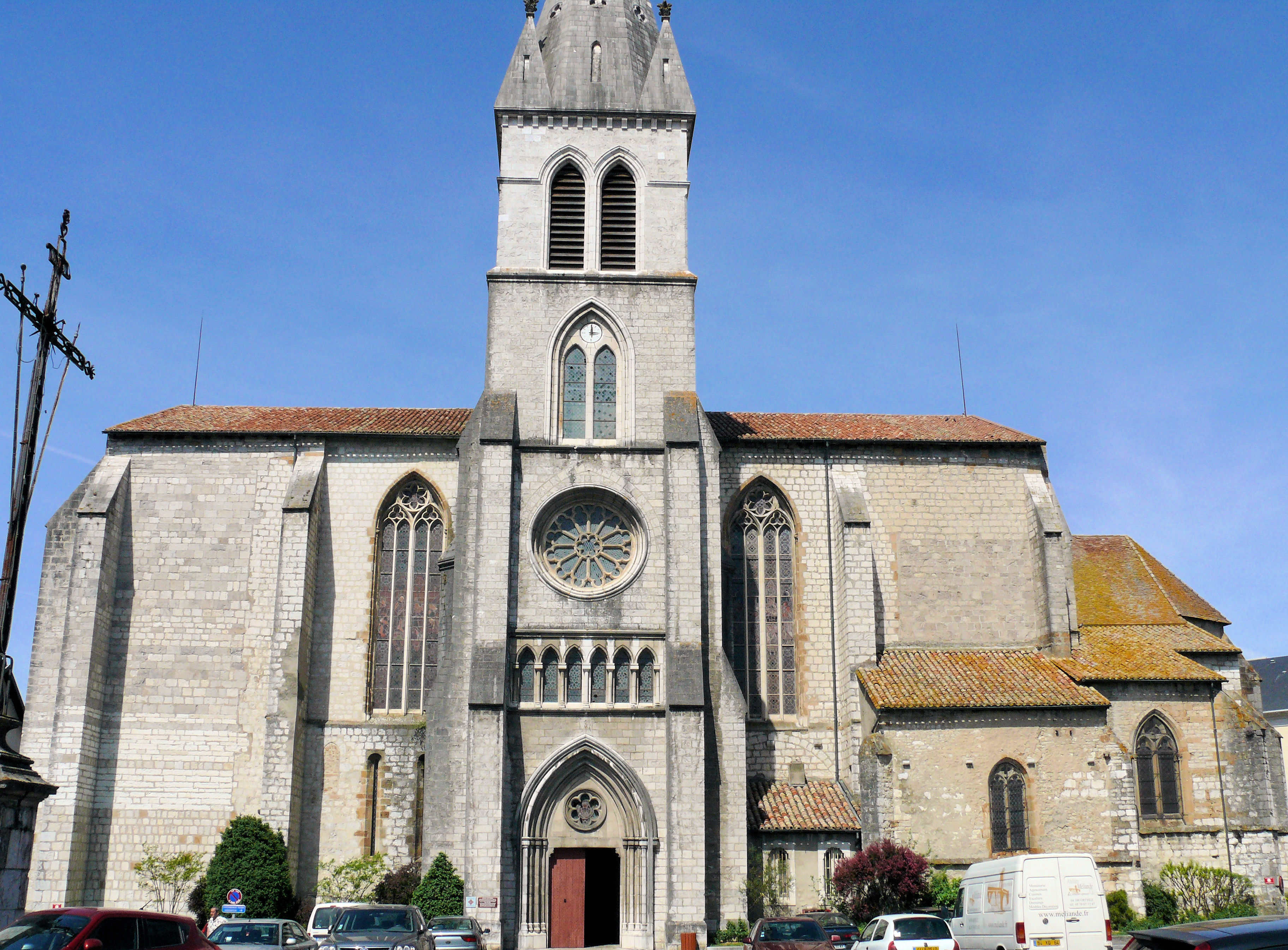 Orthez - Église Saint-Pierre - Flanc sud et clocher